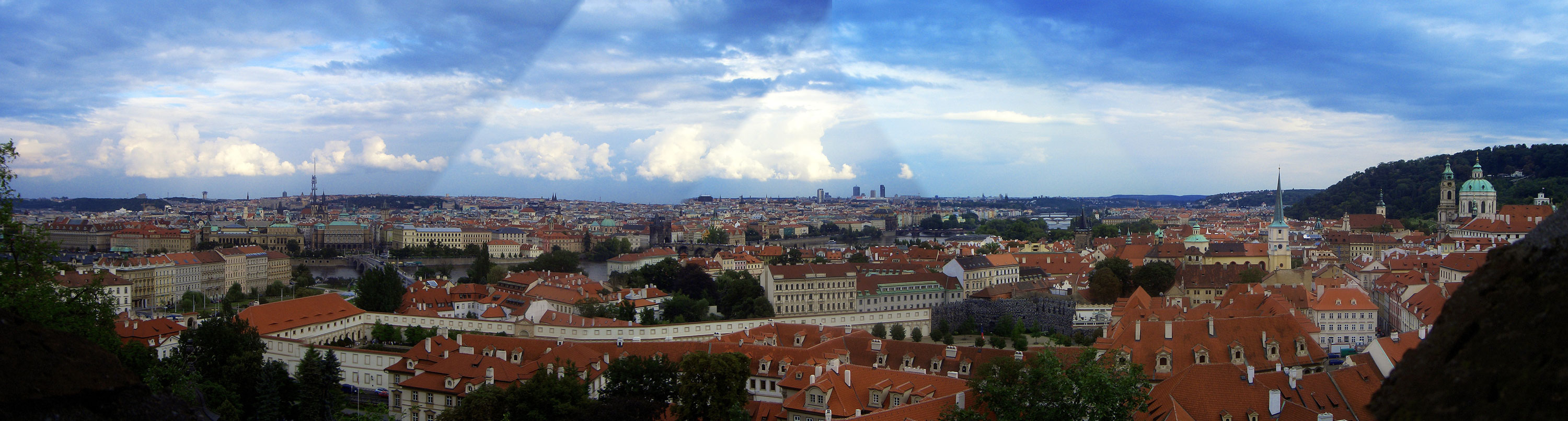 Panorama der Stadt Prag von der Prager Burg aus gesehen